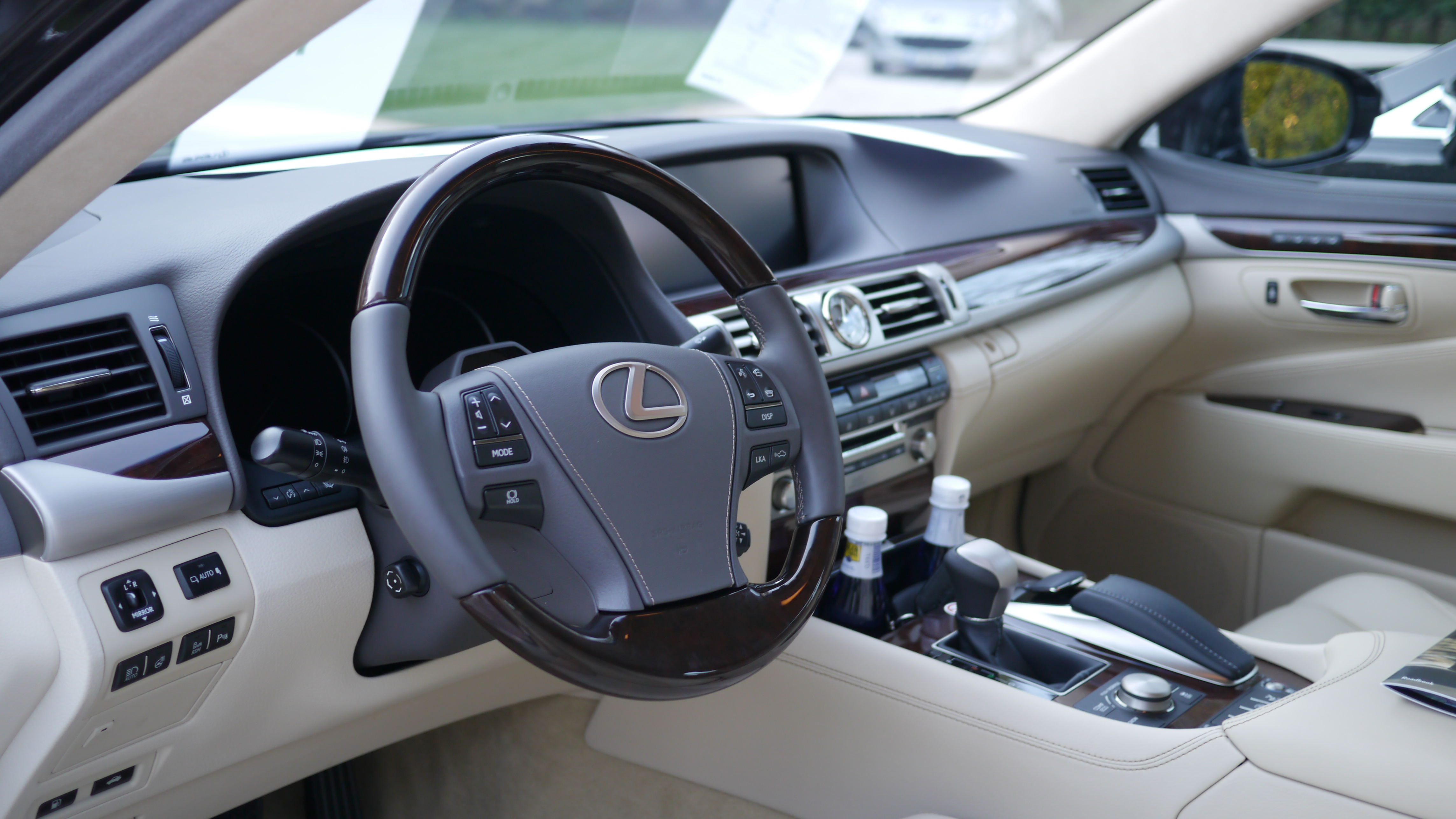 Lexus LS 2013 launch Cannes